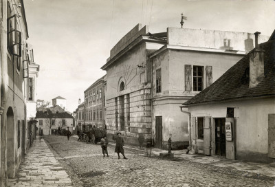 Jüdische Synagoge (1832/33) in Eisenstadt im Ghetto, im November 1938 durch die Nationalsozialisten zerstört, im Hintergrund die Türme von Schloss Esterhazy. Um 1910. Photographie von Bruno Reiffenstein.